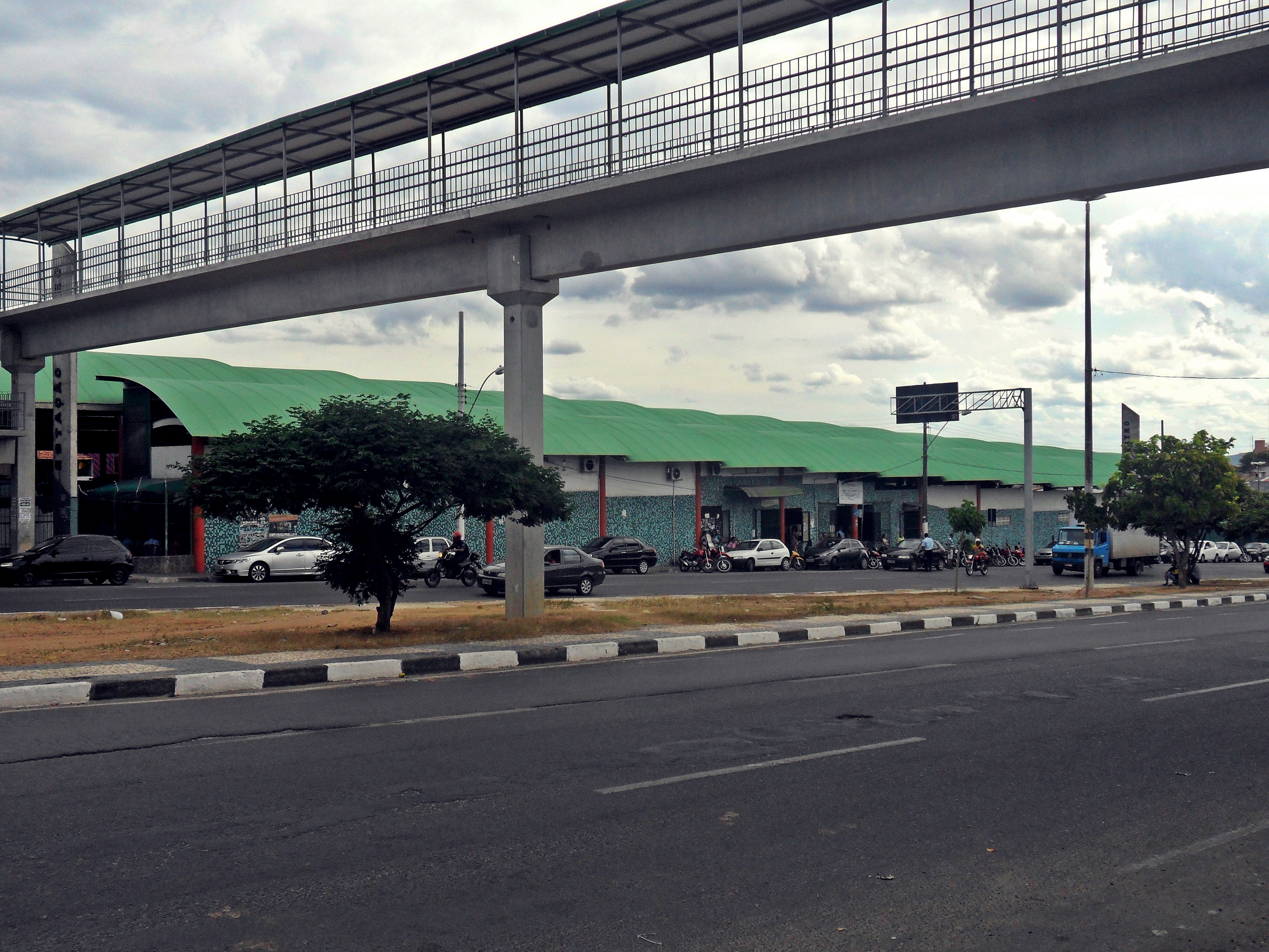 Terminal central